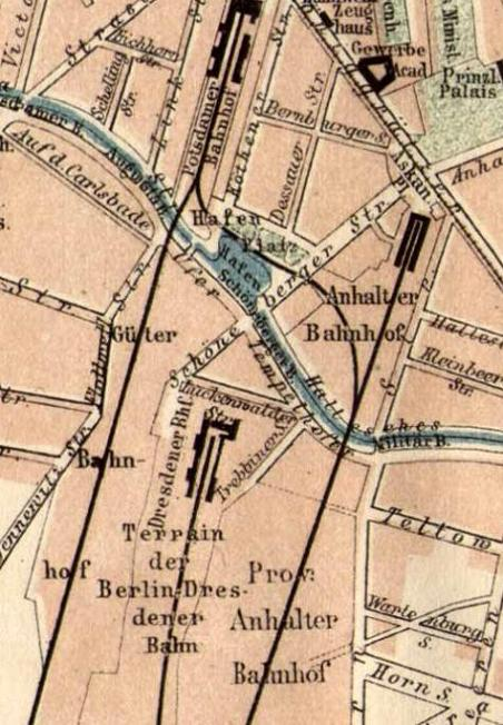 Lageplan Dresdener Bahnhof Berlin